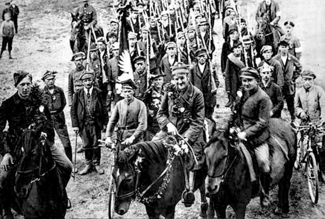 Oddział powstańczy (powstania śląskie)